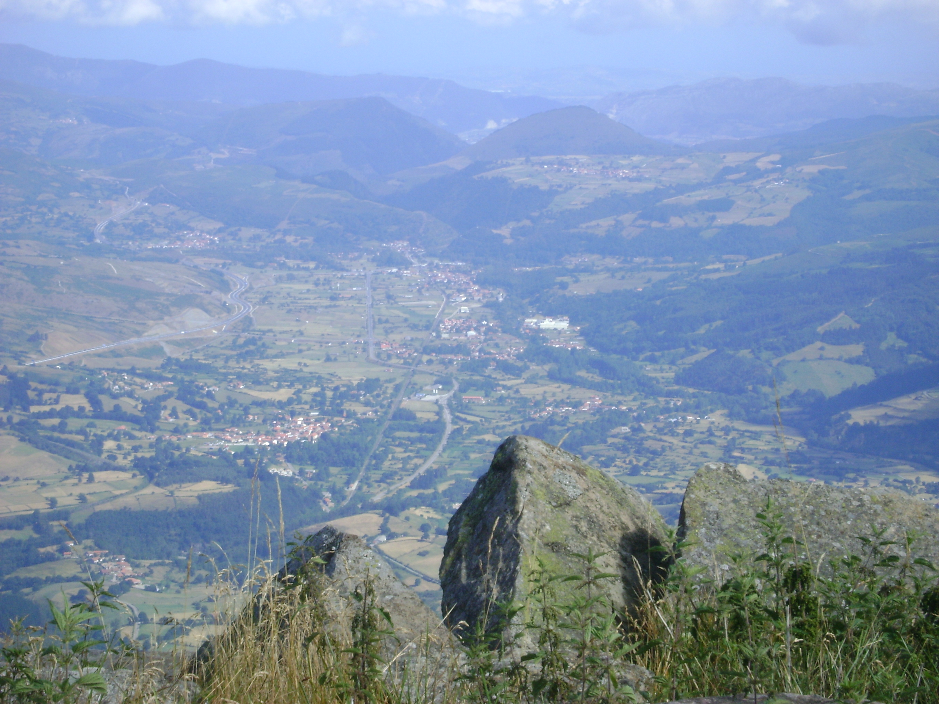 valle de iguña desde el pico jano